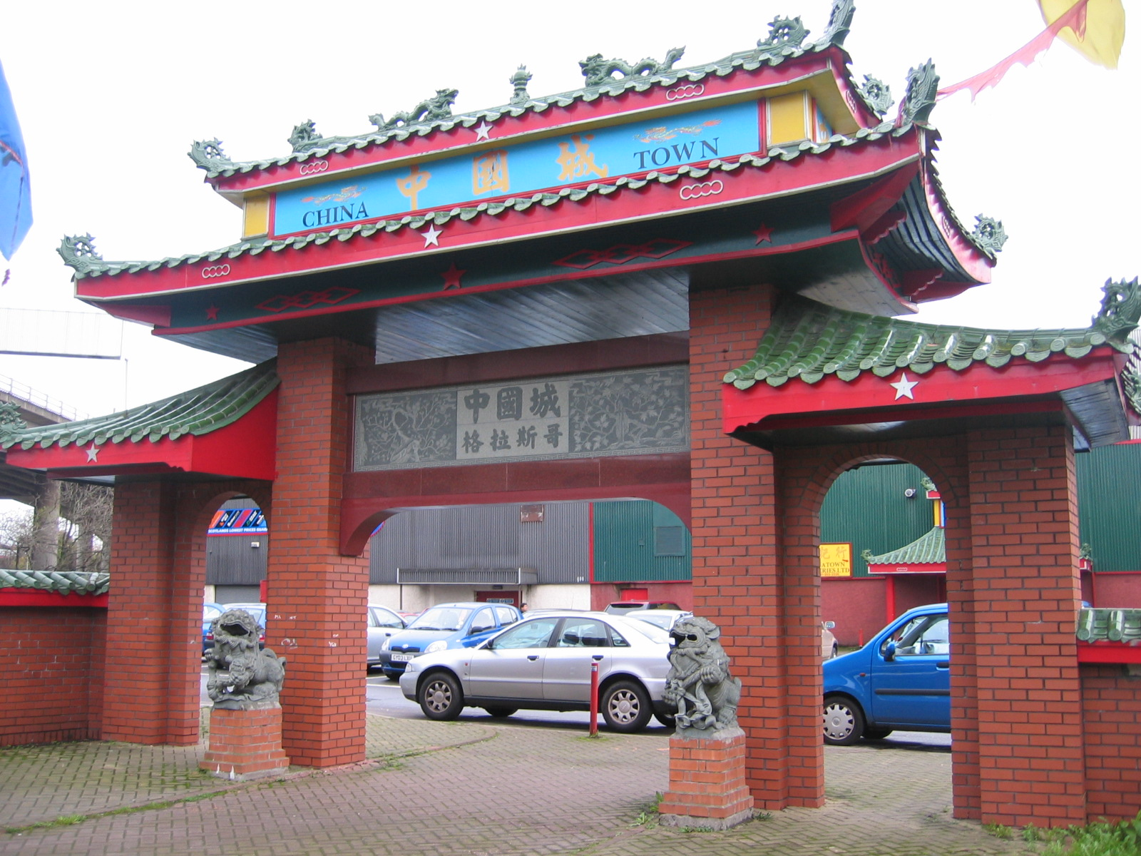 格拉斯哥中國城，本图片由上传者Wkong拍摄于2005年11月12日。